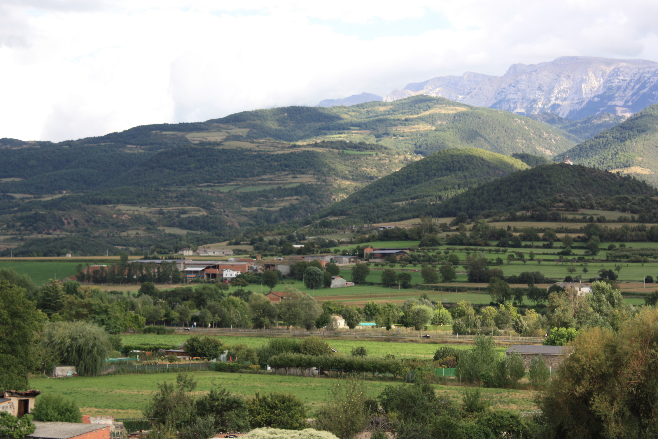 Les Torres, nucli de població disseminat del municipi de la Seu d'Urgell.